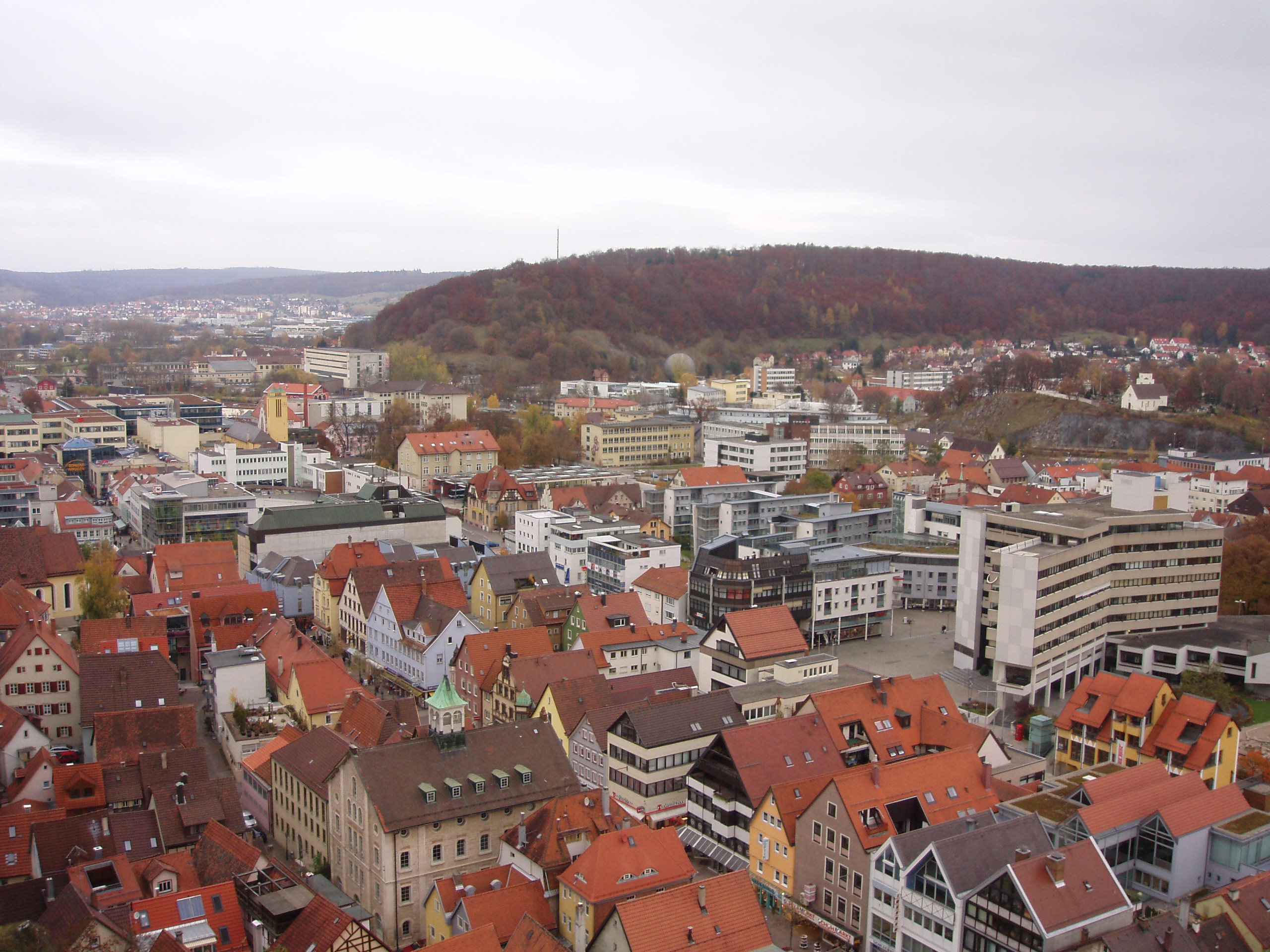 Blick über Heidenheim